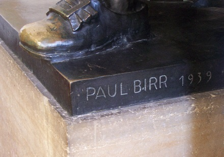 Eisenach, Georgenkirche, Bachdenkmal, Namenszug des Bildhauers Paul Birr